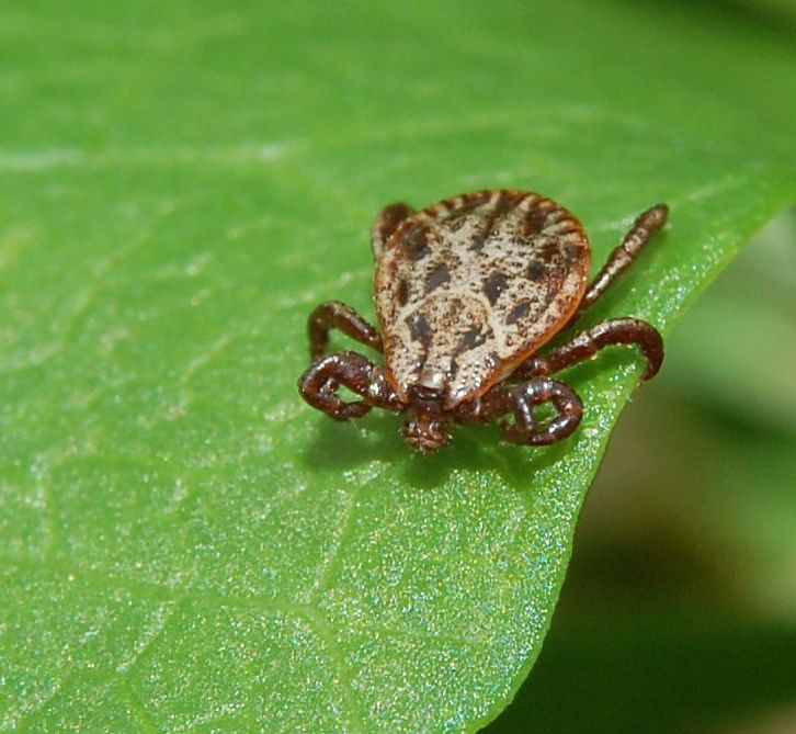 Dermacentor reticulatus, male